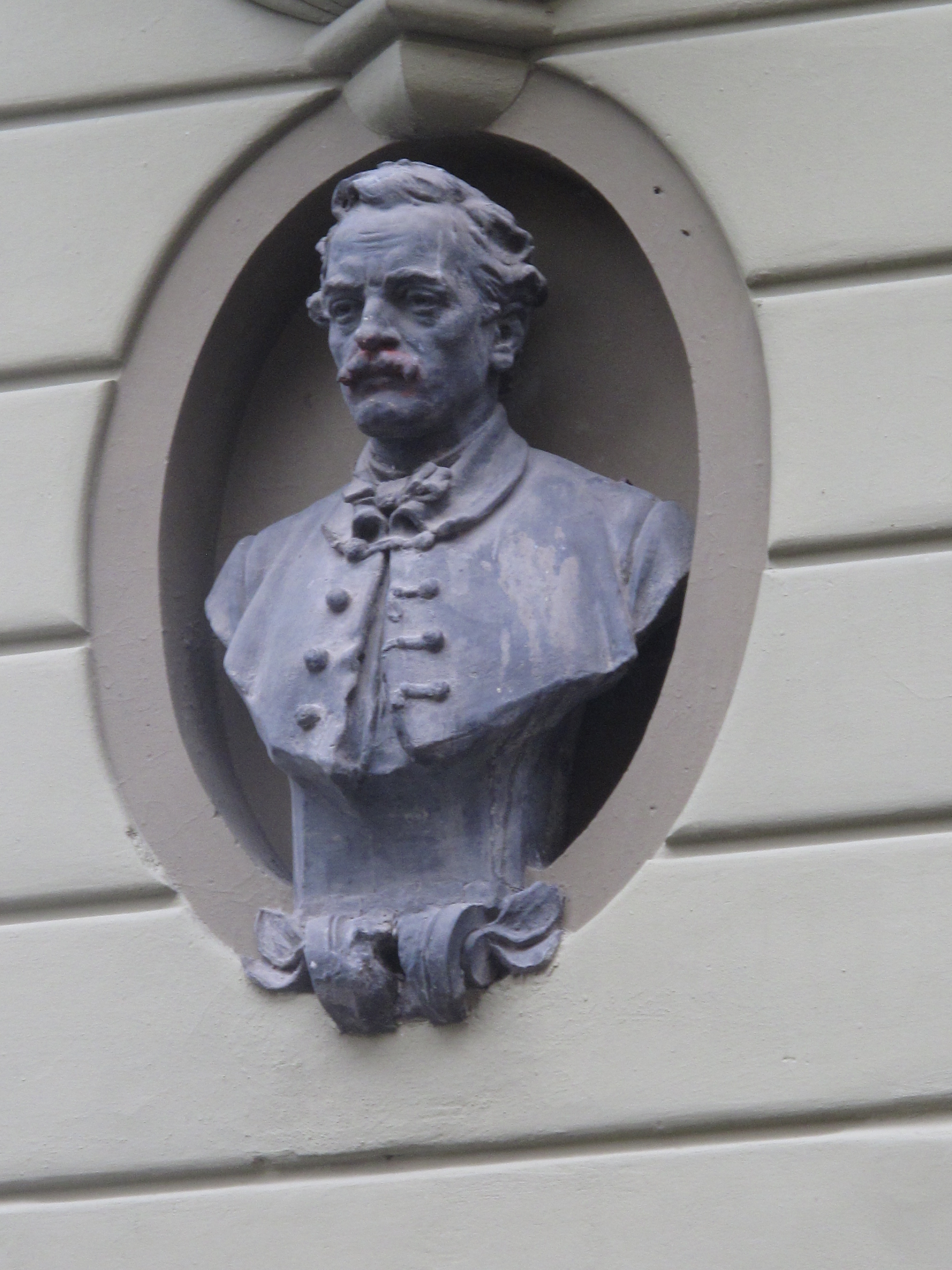 Praha - Vršovice, Sevastopolská 17, busta K. Sladkovského